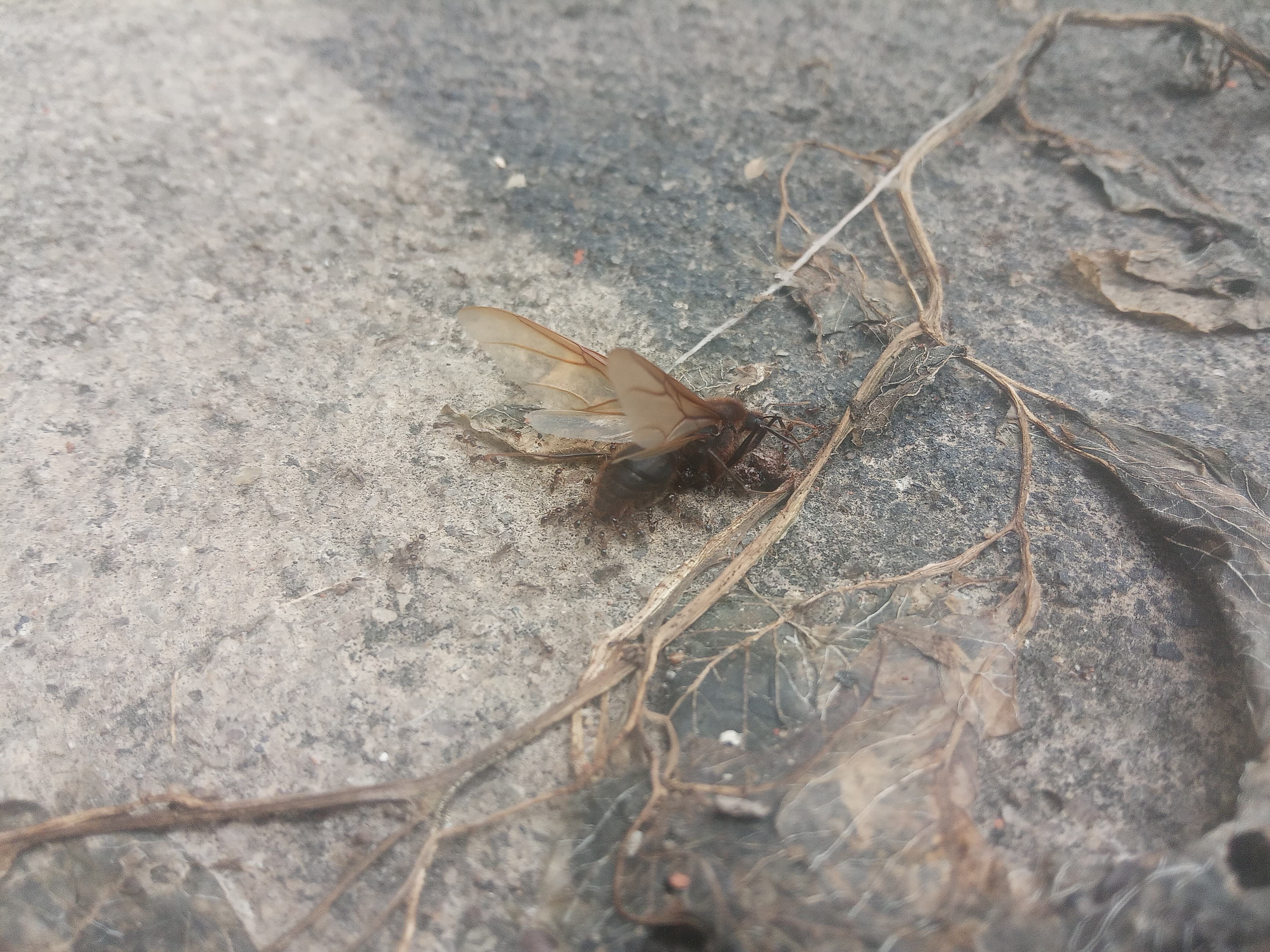 Uma tanajura morta a pouco tempo é sitiada por várias formigas, que tentam levá-la para o seu formigueiro.